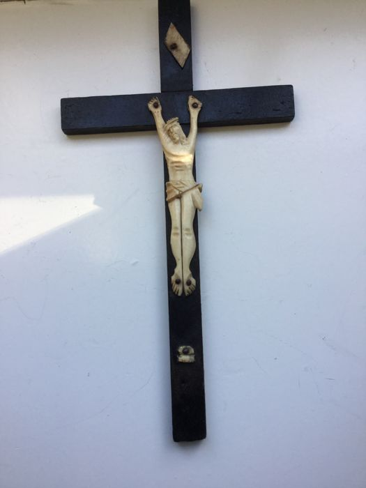 Een Hollands Jansenistisch Kruis van hout en bot